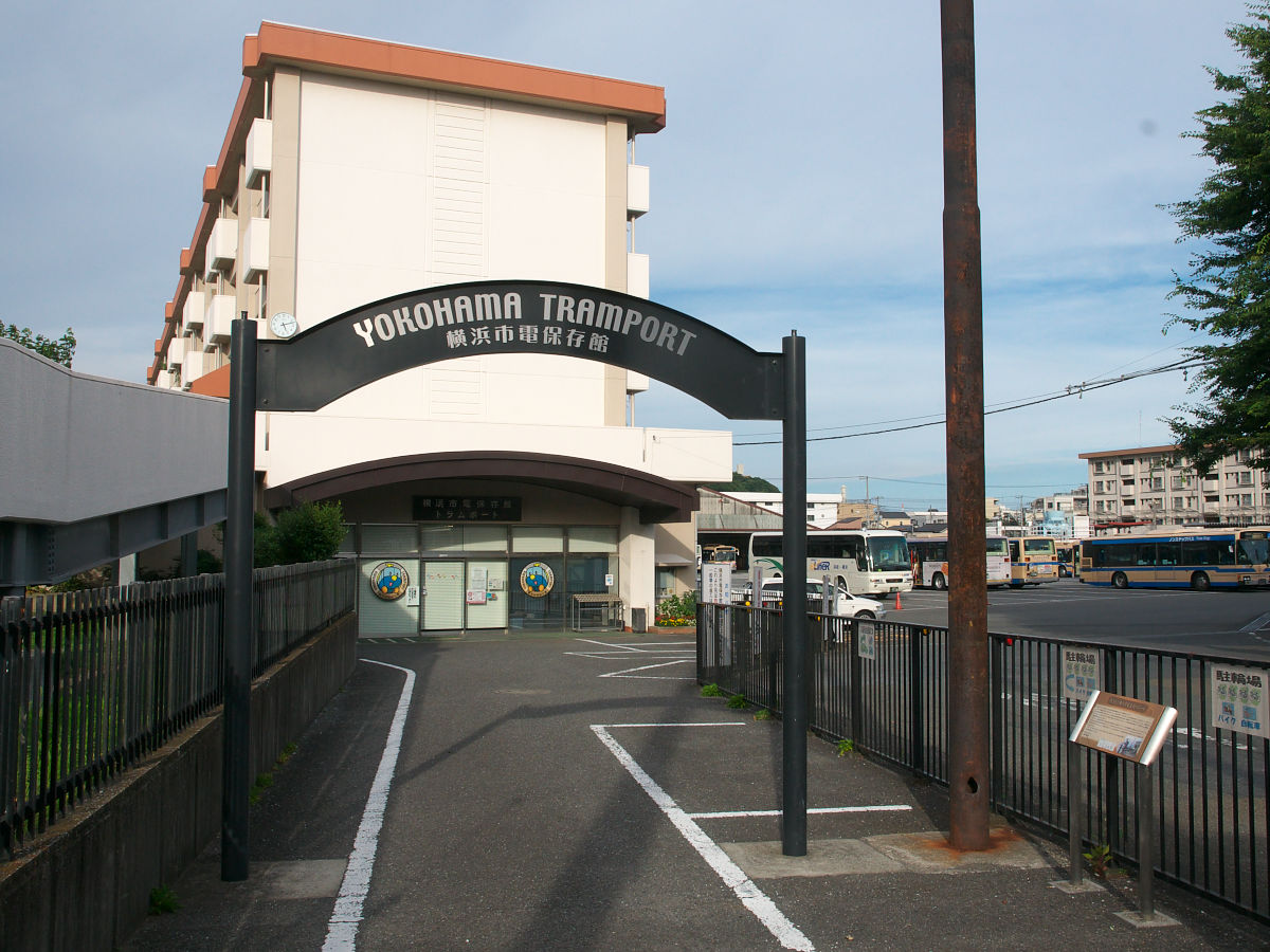 「横浜市電保存館」前景。